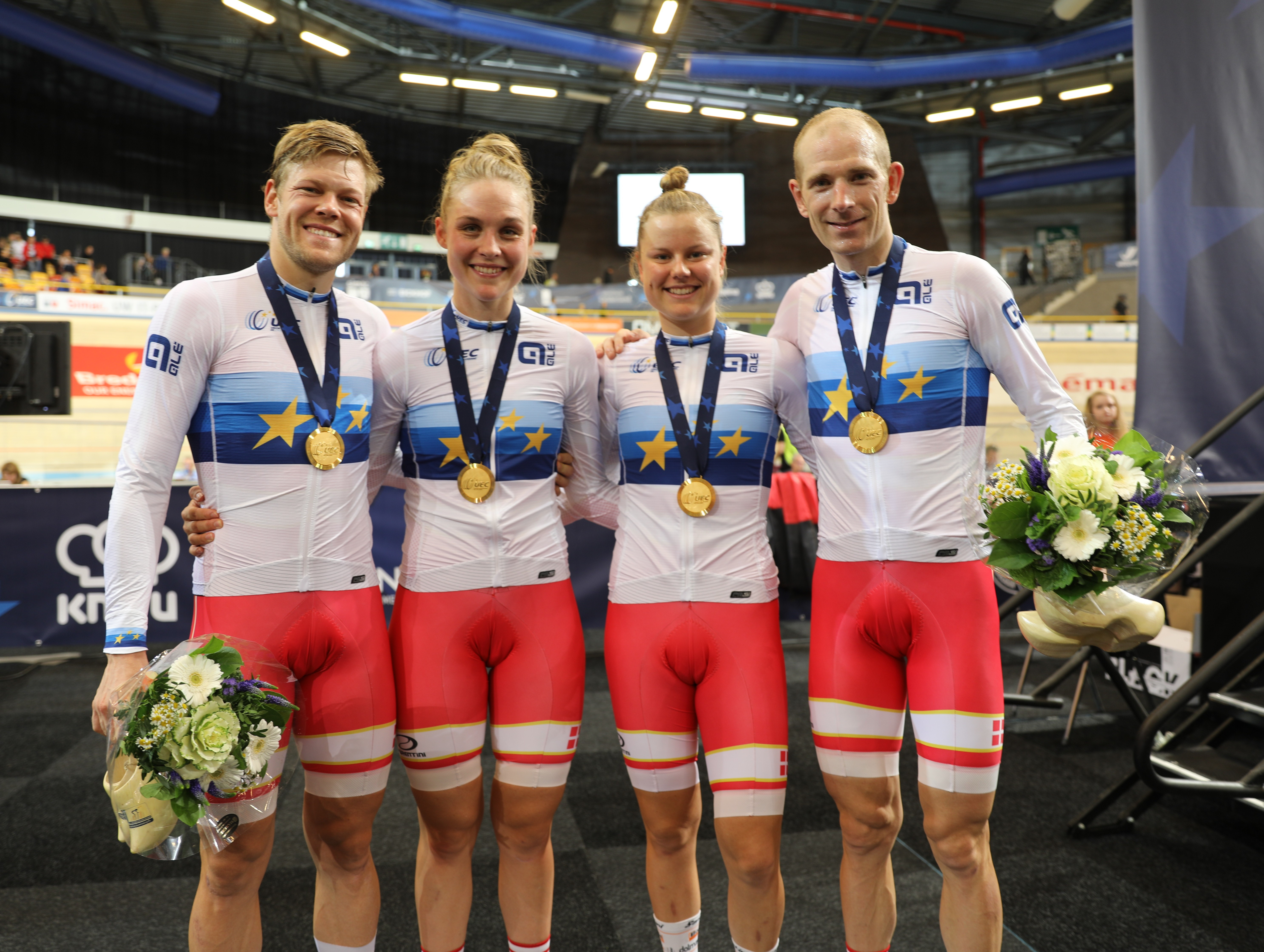 Zwei dänische Paare wurden 2019 Europameister(innen) im Zweier-Mannschaftsfahren (v.l.n.r.): Lasse Norman Hansen, Julie Leth, Amalie Dideriksen, Michael Mørkøv